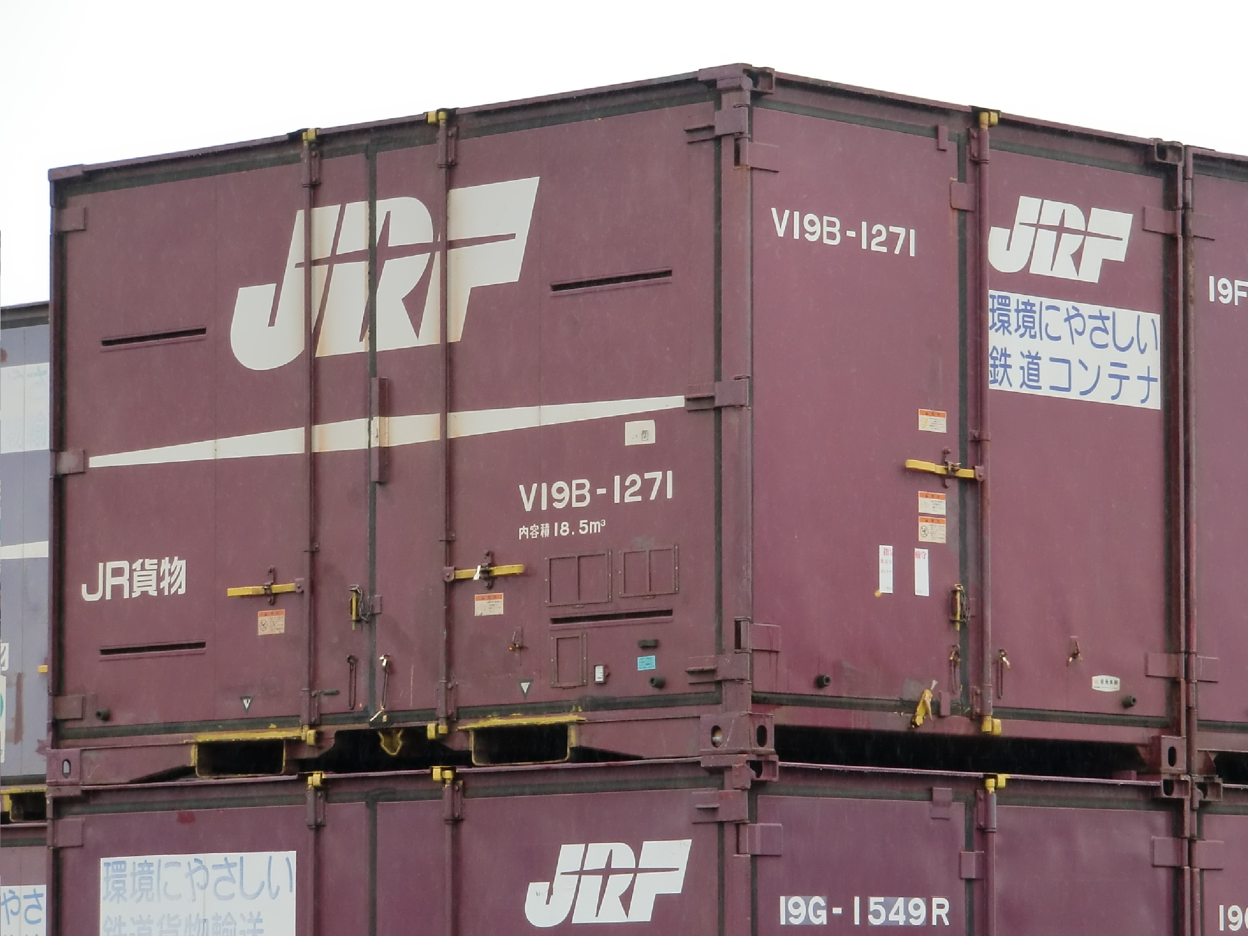 撮影地＝【埼玉／羽生ORS】